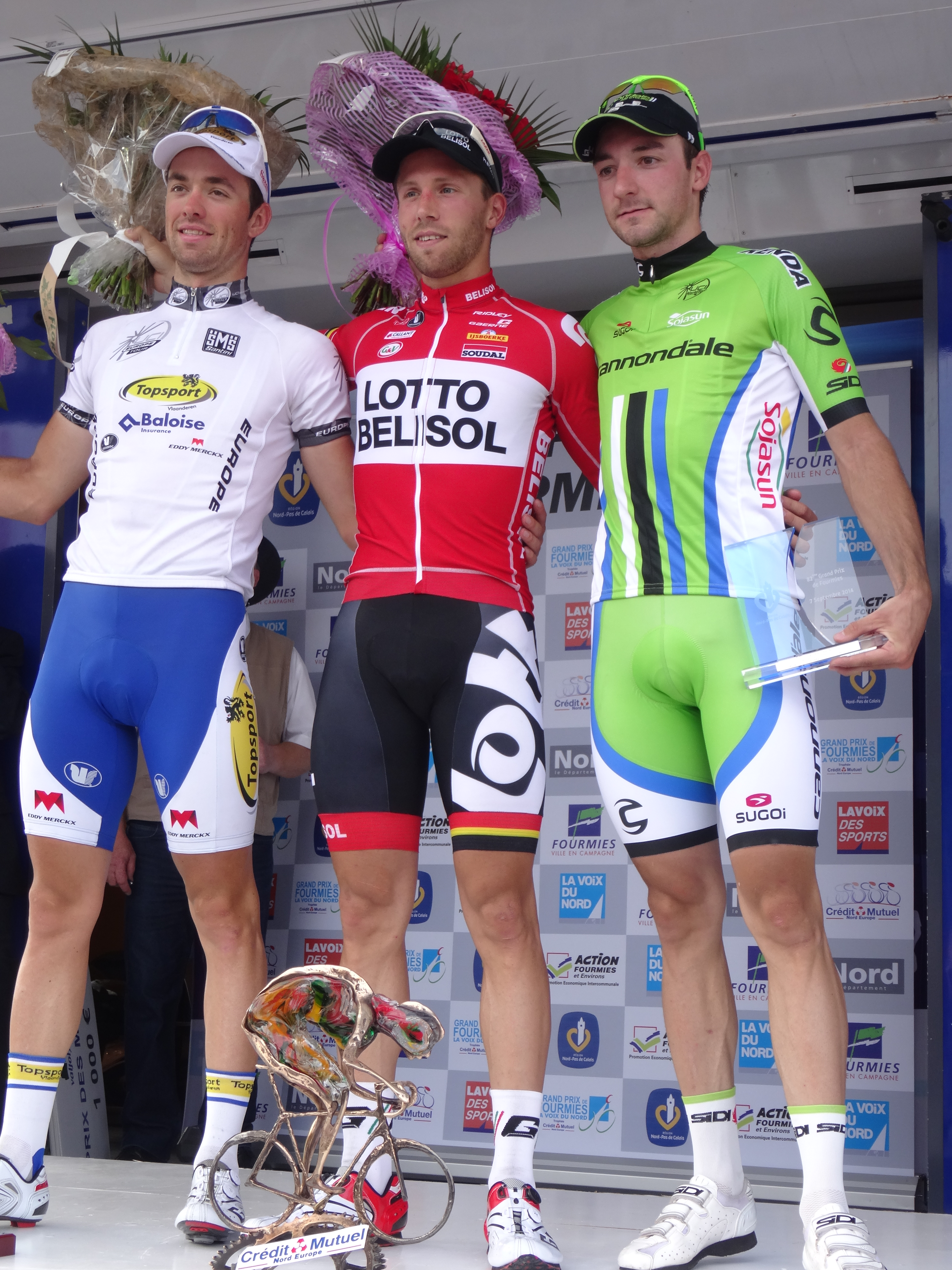 Reportage photographique réalisé le dimanche 7 septembre à l'occasion du départ et de l'arrivée du Grand Prix de Fourmies 2014 à Fourmies, Nord-Pas-de-Calais, France.